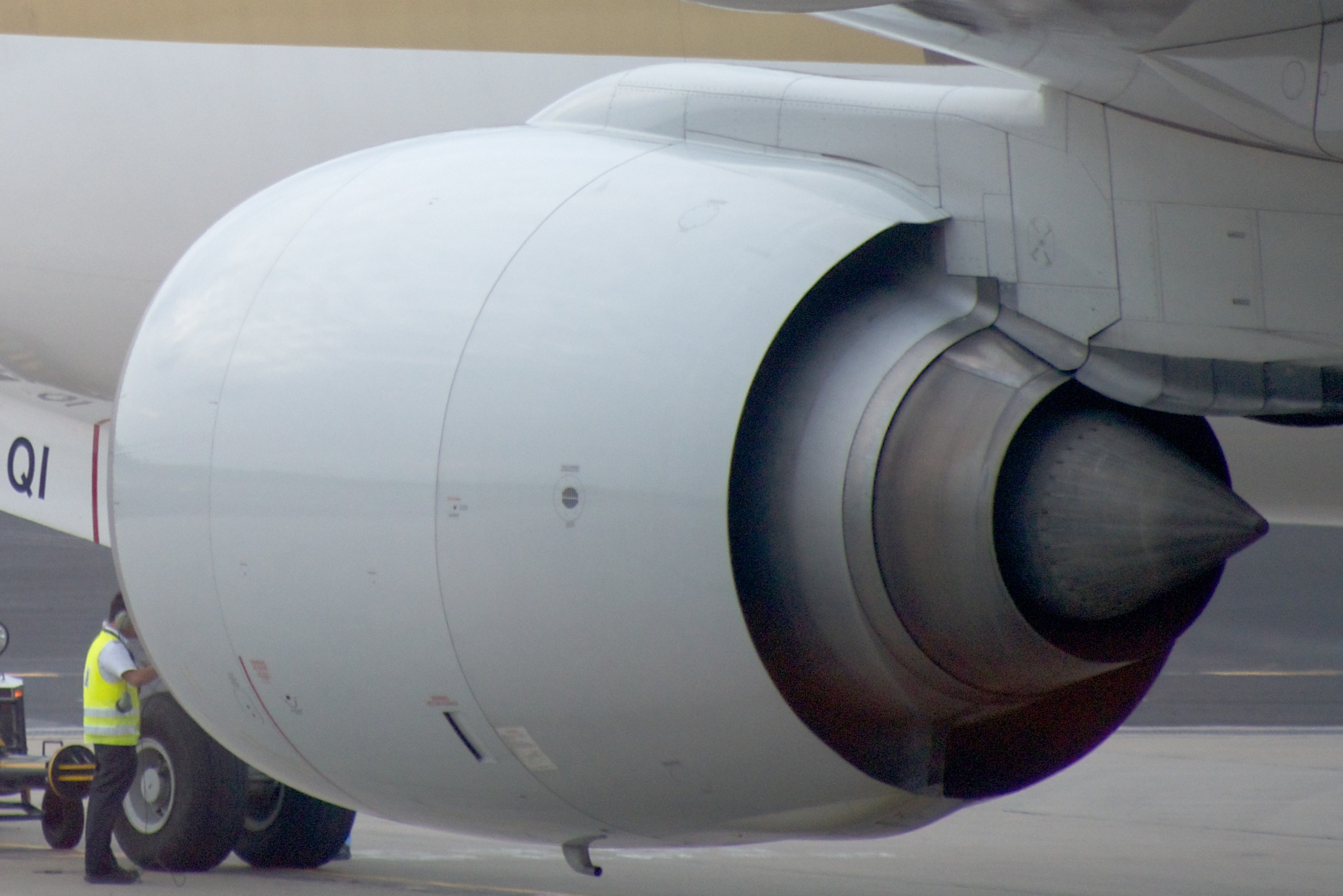 9V-SQI | c/n 28530 | 777-212ER | Singapore Airlines | Singapore | Changi